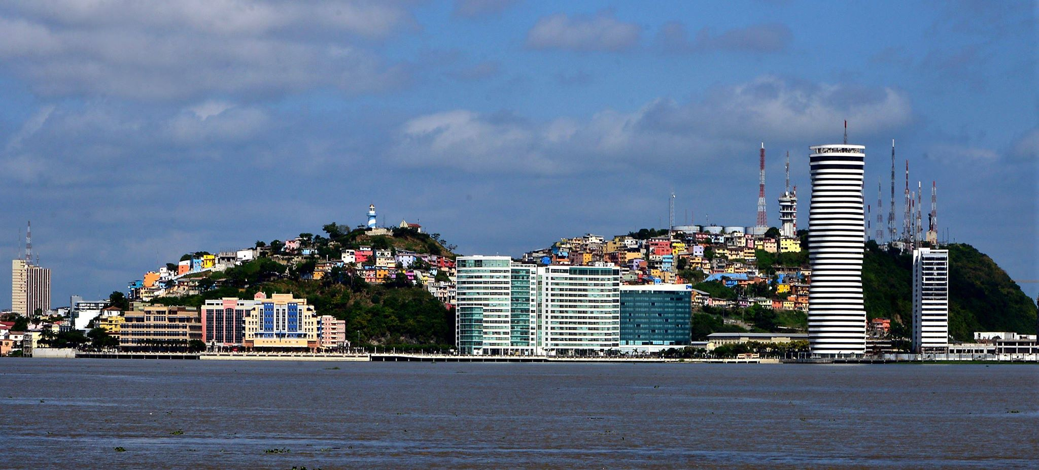 Guayaquil